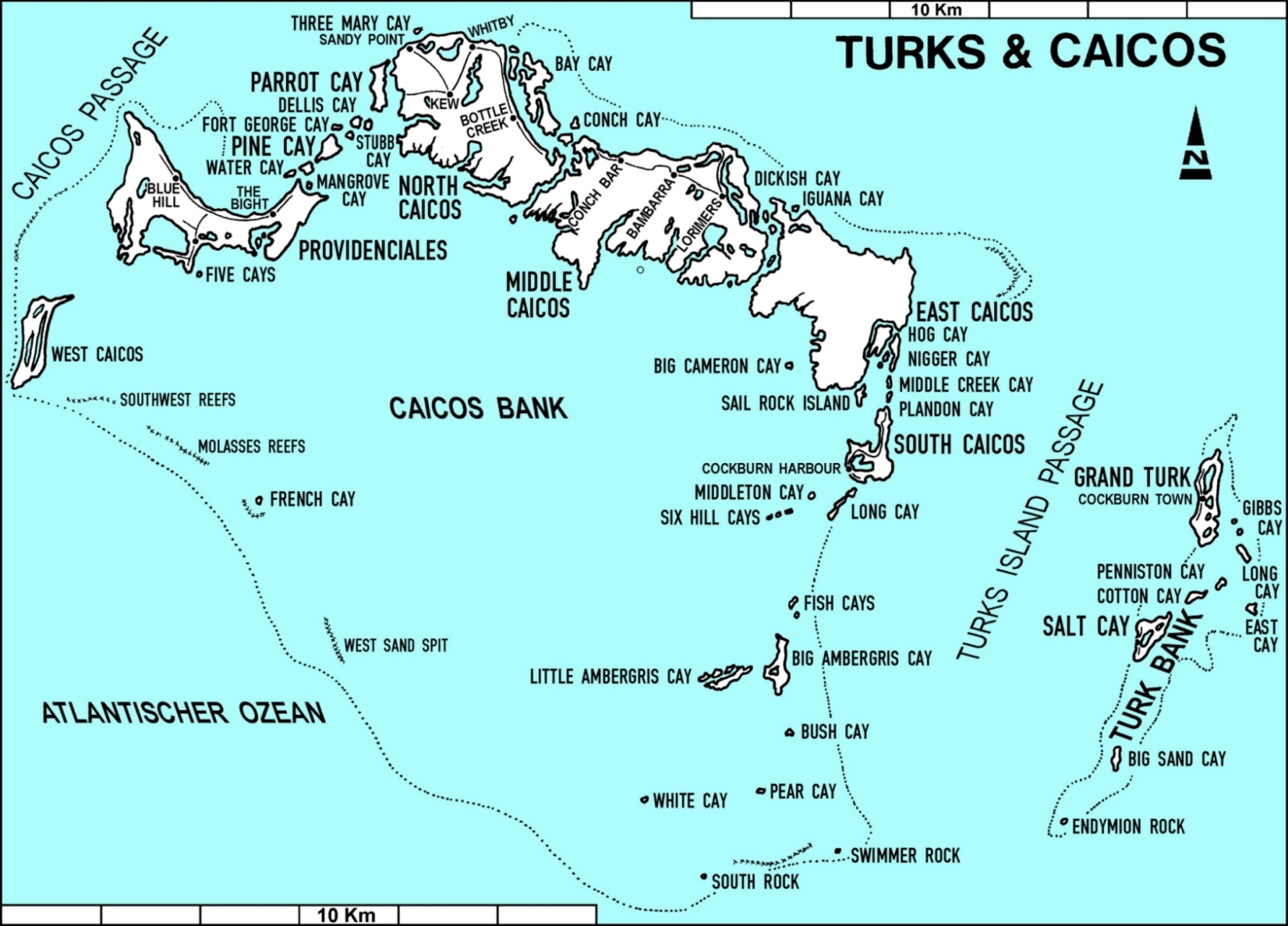 Karte Turks und Caicos Inseln